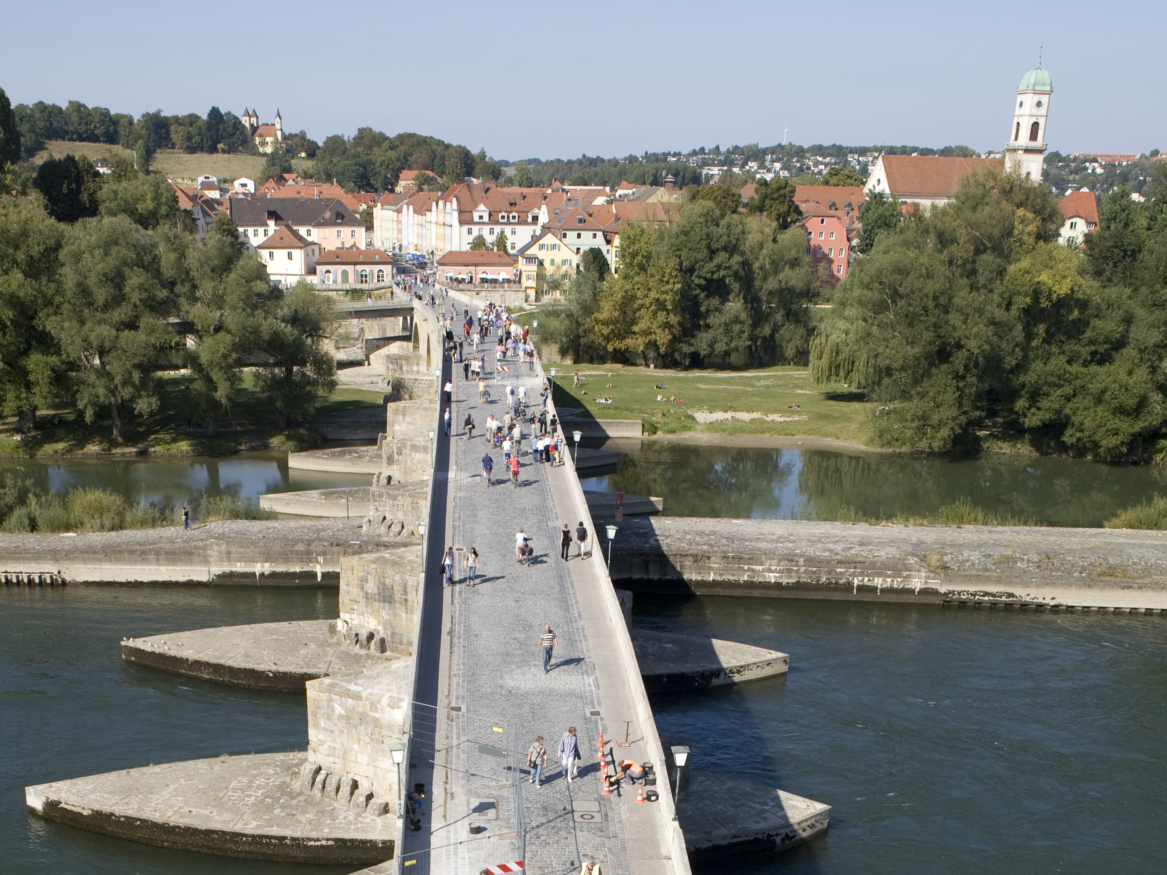 Stadtamhof (UNSCO-Welterbe) Blickrichtung von Regensburg nach Norden über die Donau (Steinerne Brücke) nach Stadtamhof. Bildmitte: Jahninsel. Am nördlichen Brückenkopf: Regensburger Stadtteil Stadtamhof. Rechts: Kirche St. Mang in Stadtamhof der Pfarrei St. Andreas / St. Mang. Am Bergrücken links oben: Pestgelöbniskirche "zur Heiligen Dreifaltigkeit" der Pfarrgemeinde Regensburg-Steinweg.